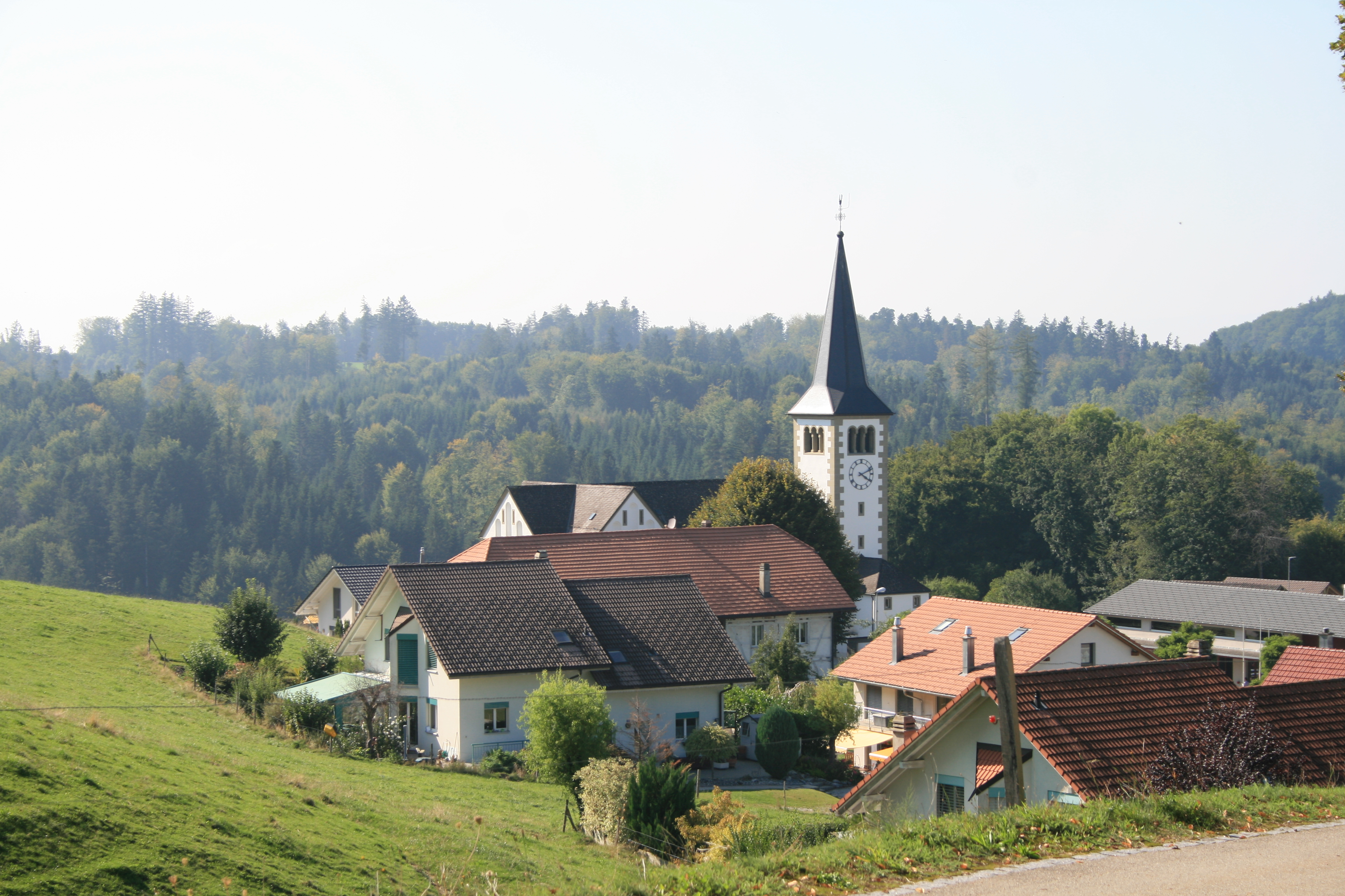 Kath. Kirche, St. Antoni